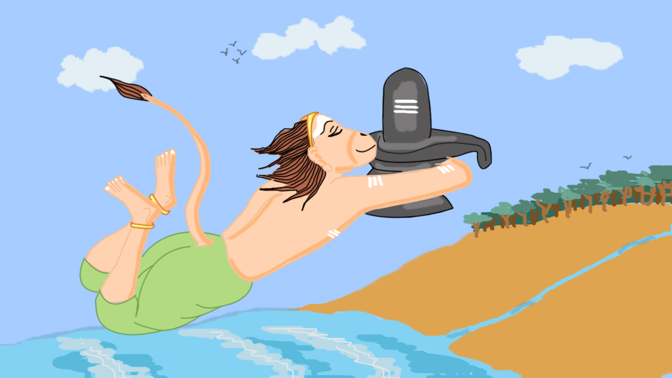 வாலி இலிங்கத்தினை கொண்டு செல்லுதல்